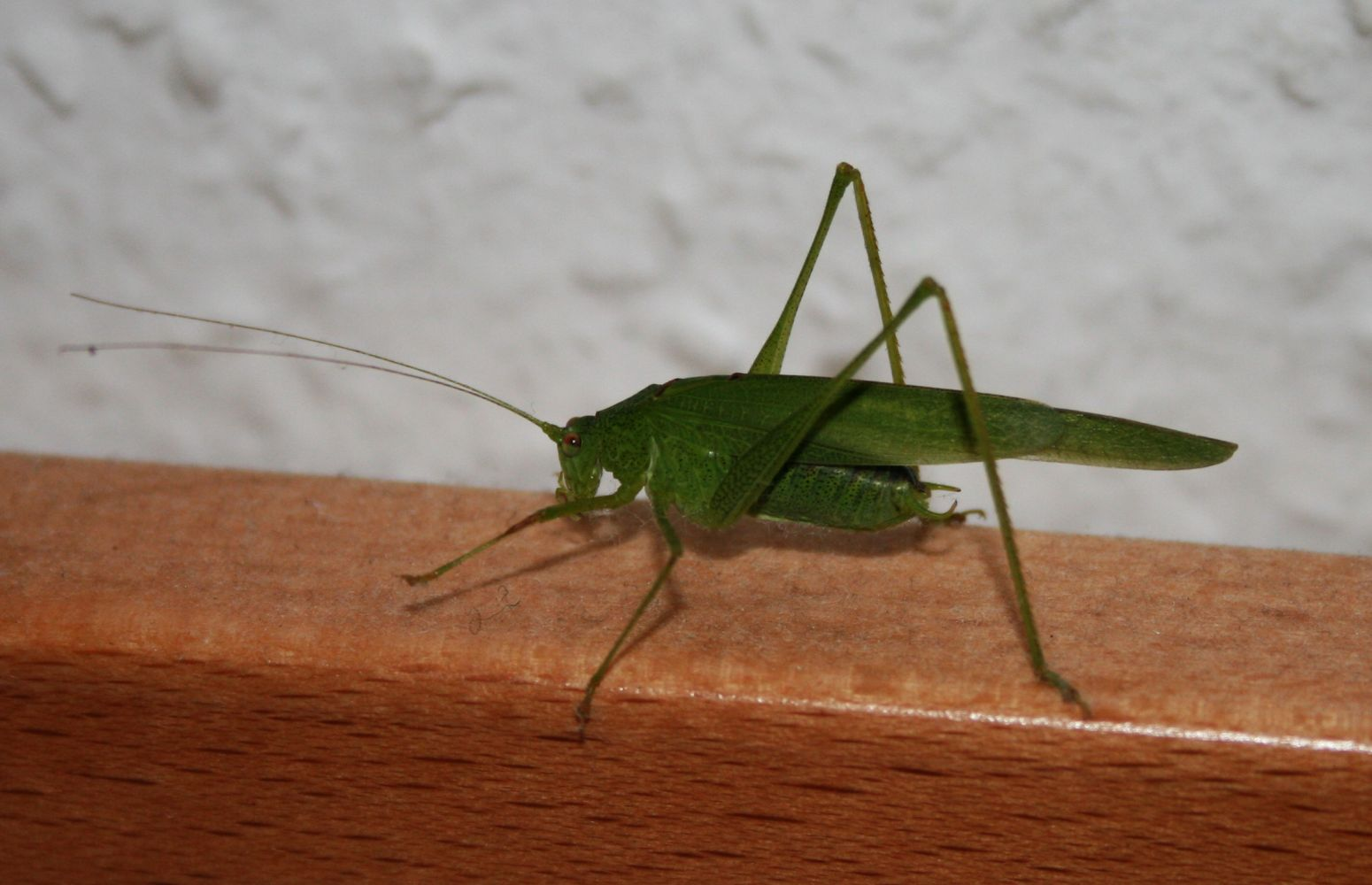 Vierpunktige Sichelschrecke (Phaneroptera nana), Sichelschrecken (Phaneropteridae) – Österreich/Austria/Autriche: Wien-Meidling